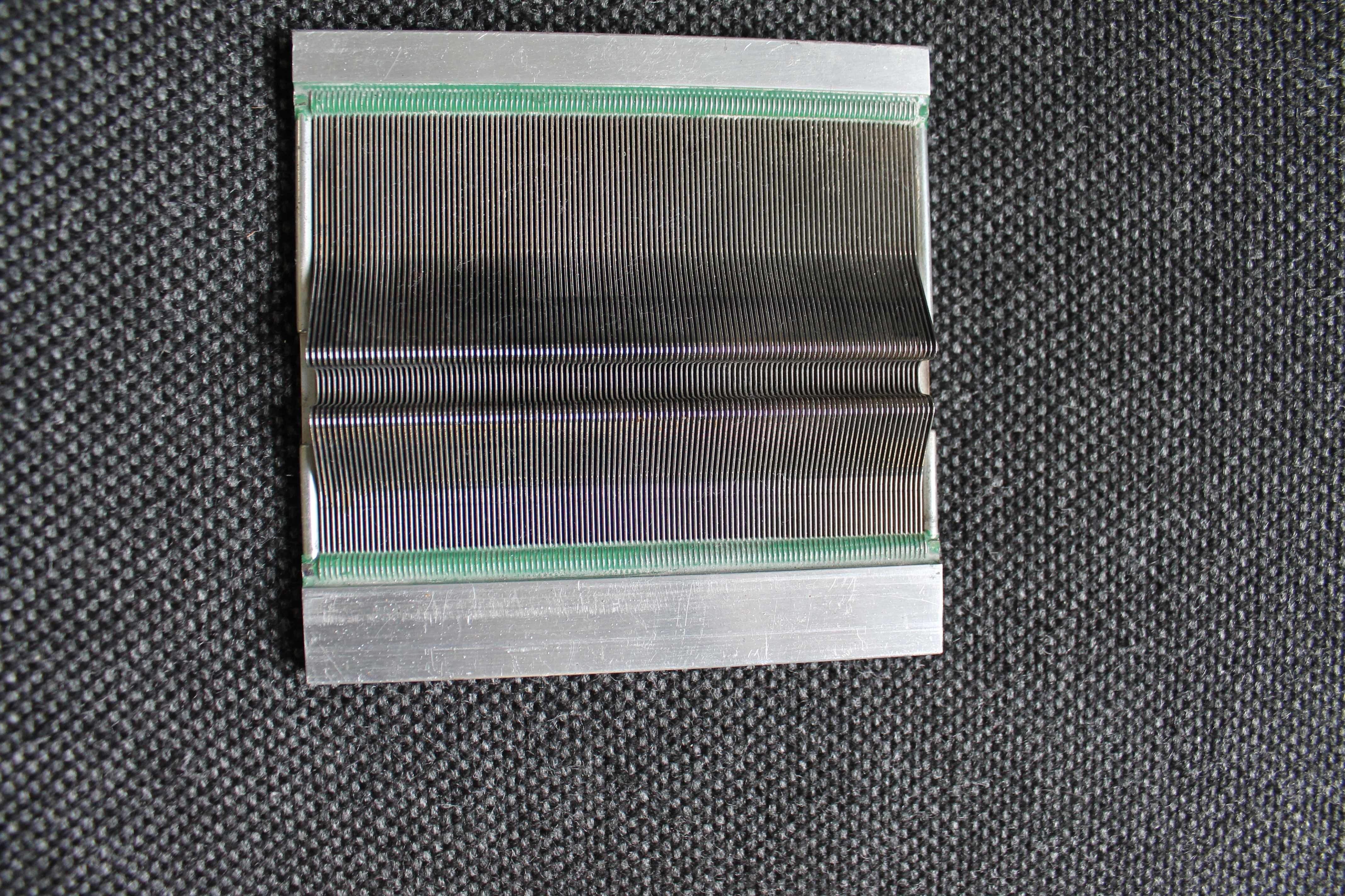 Tunnelwebblatt vom Luftdüsenwebstuhl